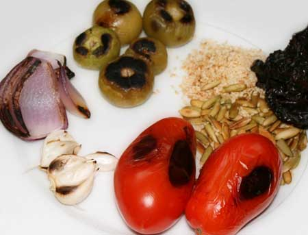 Ingredientes para realizar un Pepián de pollo guatemalteco.